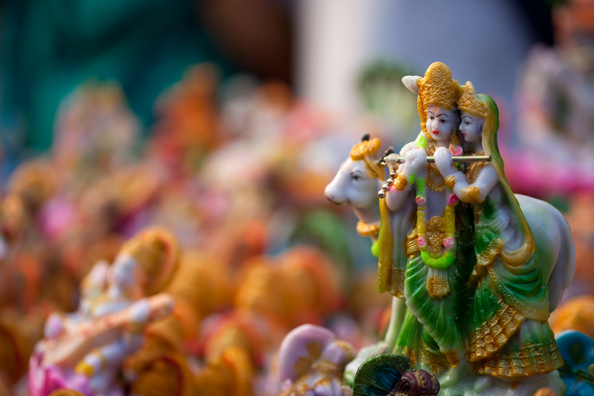 Krishna and Radha Golu dolls